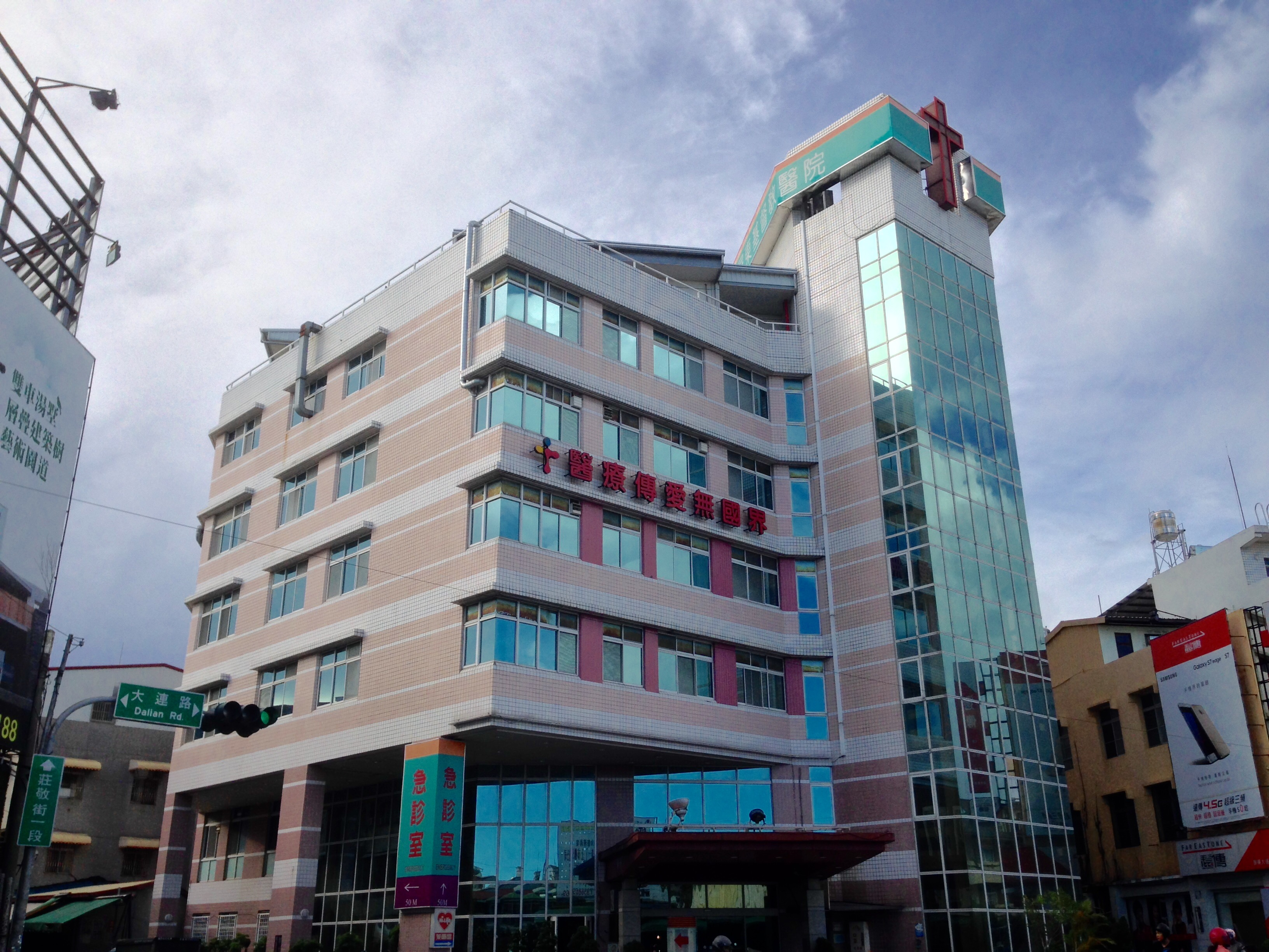 中文（台灣）: 屏東基督教醫院，位於屏東縣屏東市大連路60號。